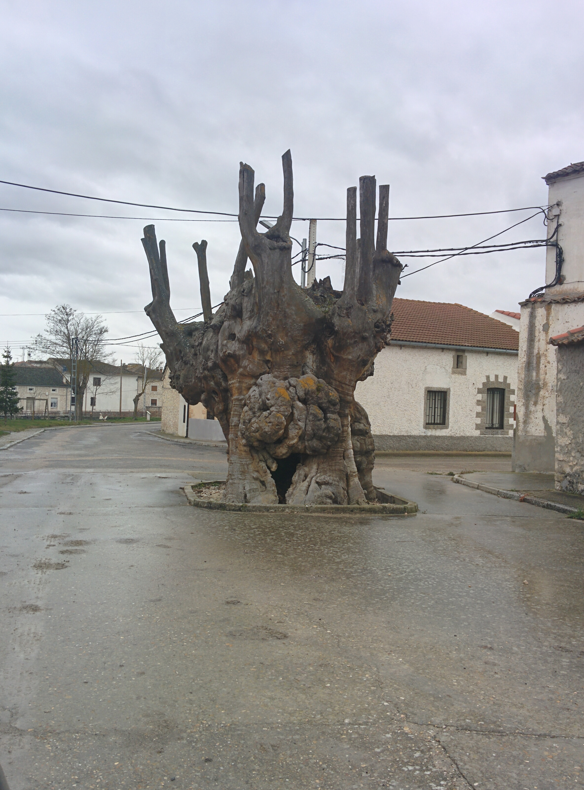 Olma de Frumales (Segovia, España).